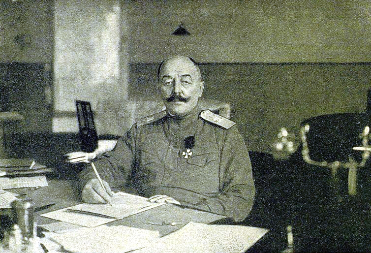 Начальник Штаба Главнокомандующего армиями Западного фронта генерал-лейтенант Квецинский Михаил Фёдорович